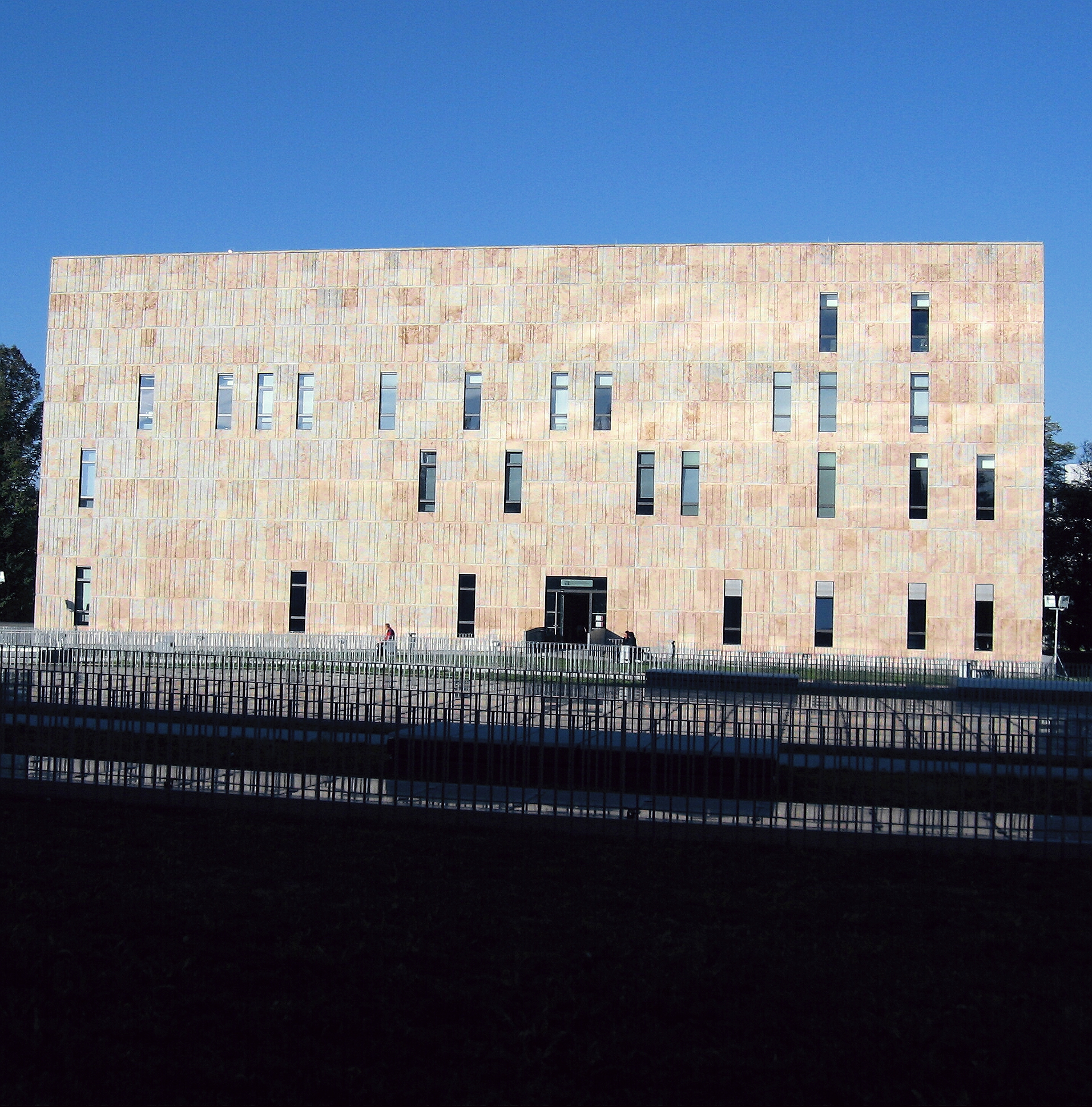 Sächsische Landesbibliothek − Staats- und Universitätsbibliothek Dresden